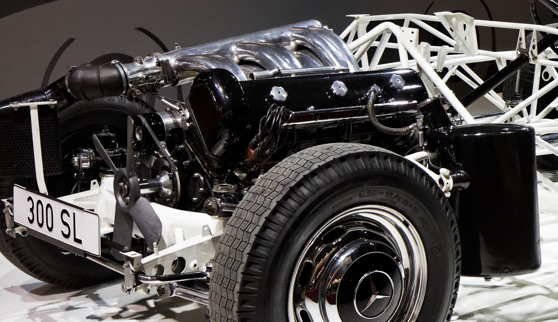 Motor M-186 de Mercedes 300 SL